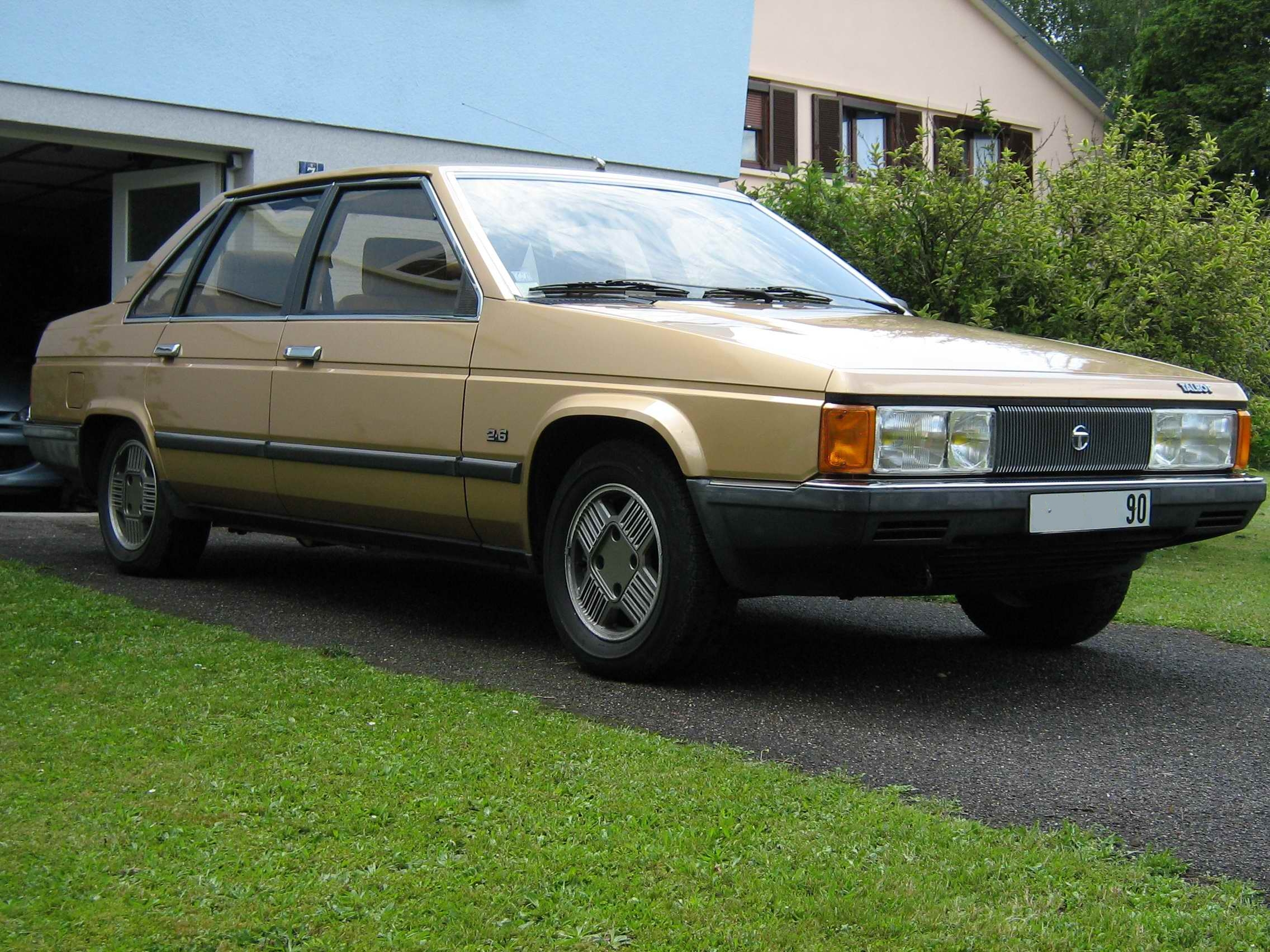 1982 Talbot Tagora SX, 2.7 litre V6.